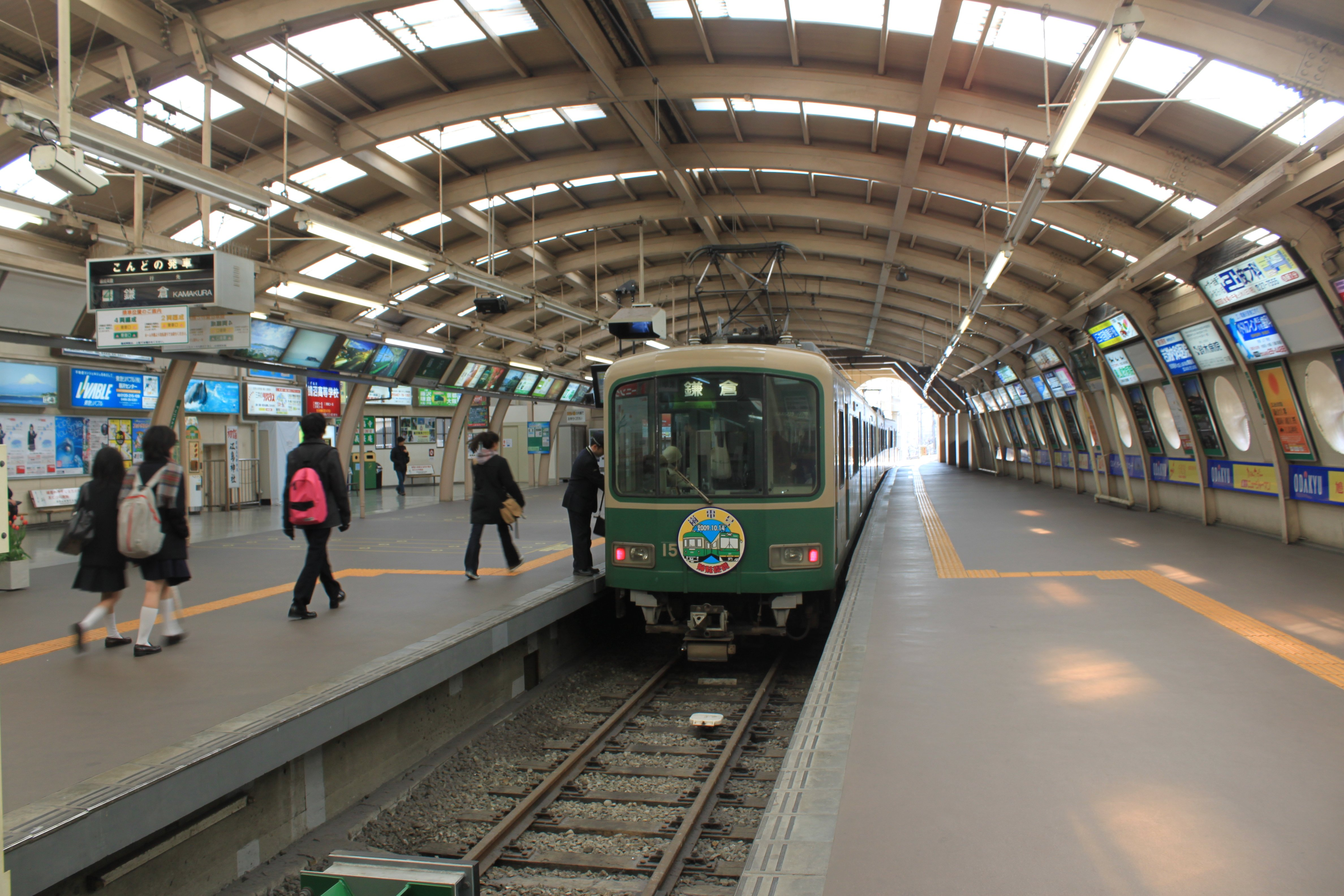 藤沢駅